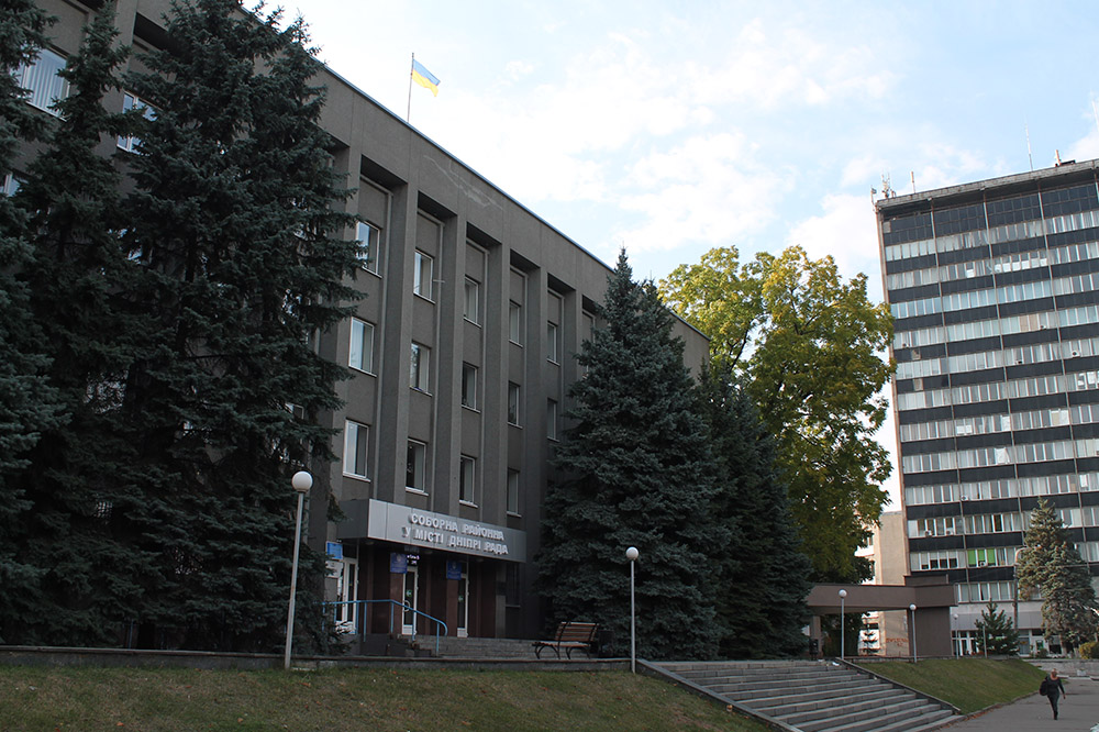 Соборна районна у місті Дніпрі рада.